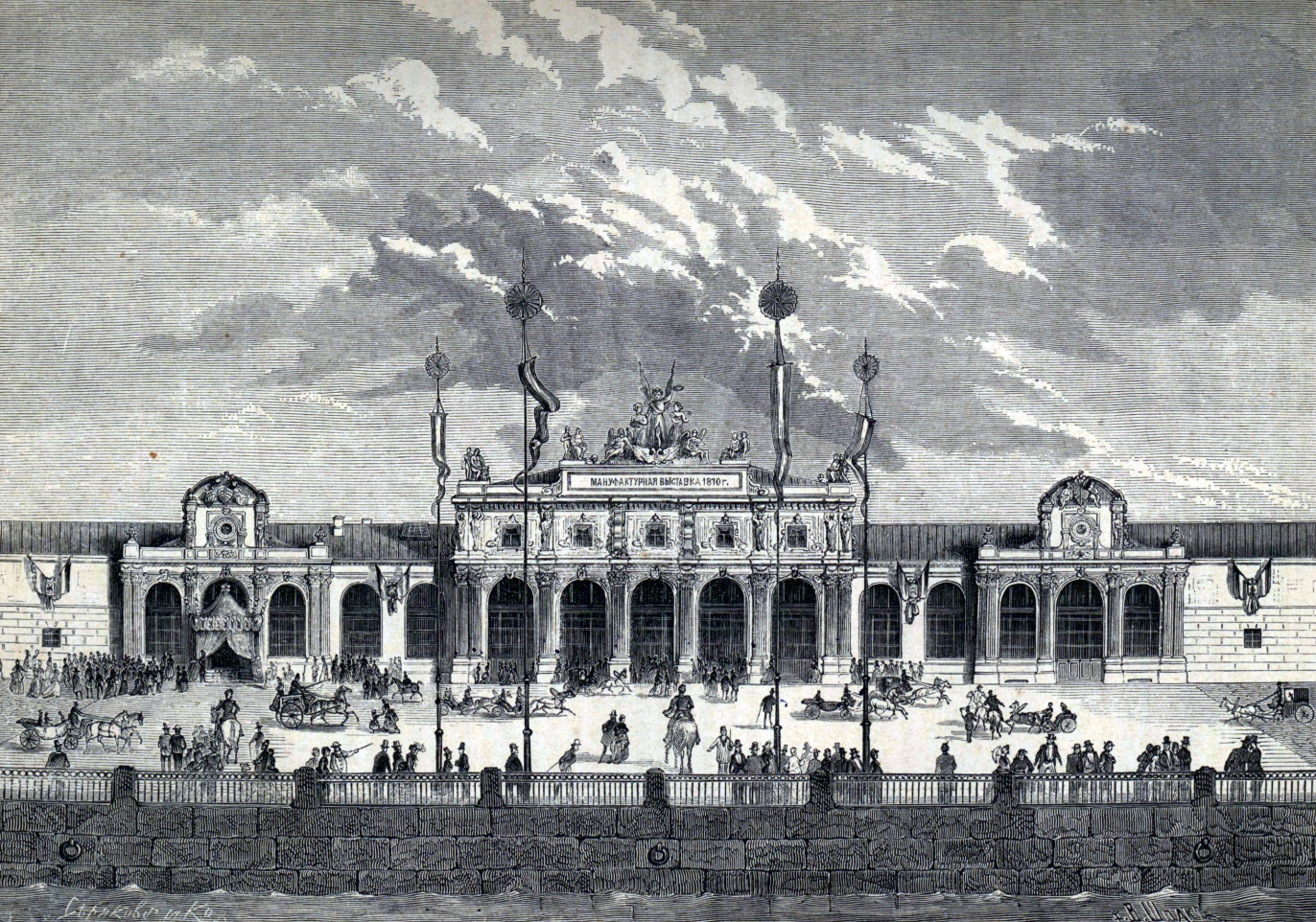 Фасад и главный подъезд Всероссийской мануфактурной выставки. Санкт-Петербург, 1870 год.